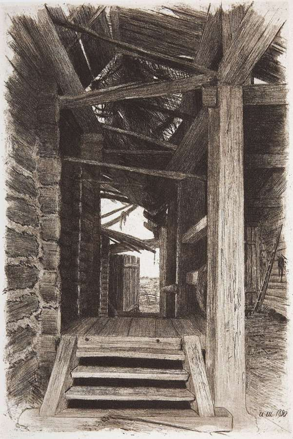 Шишкин И. И. "Сени". 1890 год